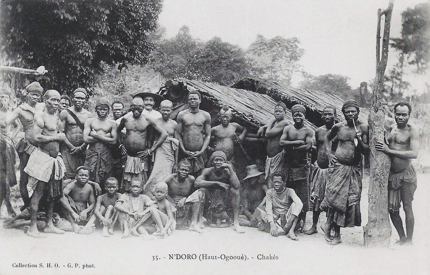 N'Doro (Haut-Ogooué). Chakès. Collection S.H.O. G.P. phot.